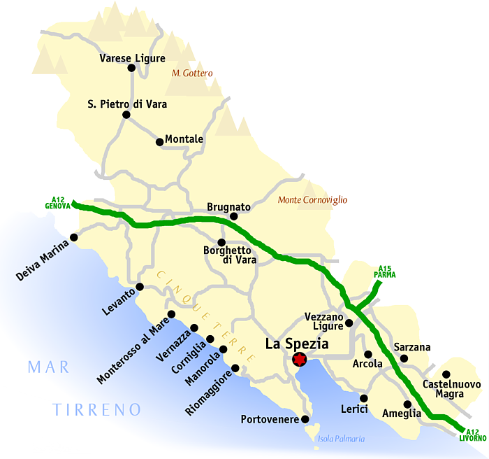 Kaart van de provincie La Spezia